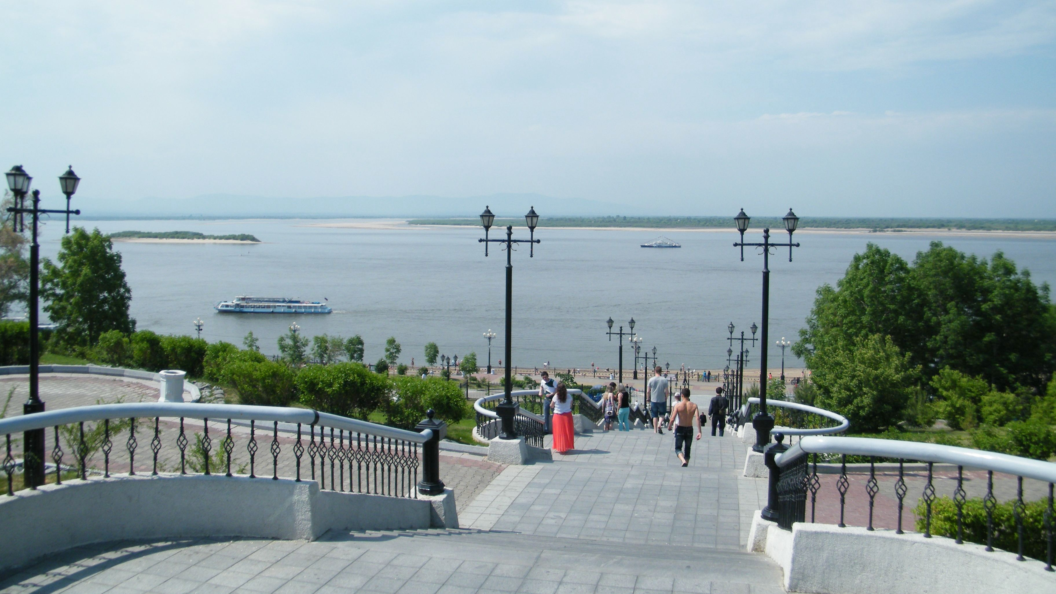 Вид на Амур, Хабаровск